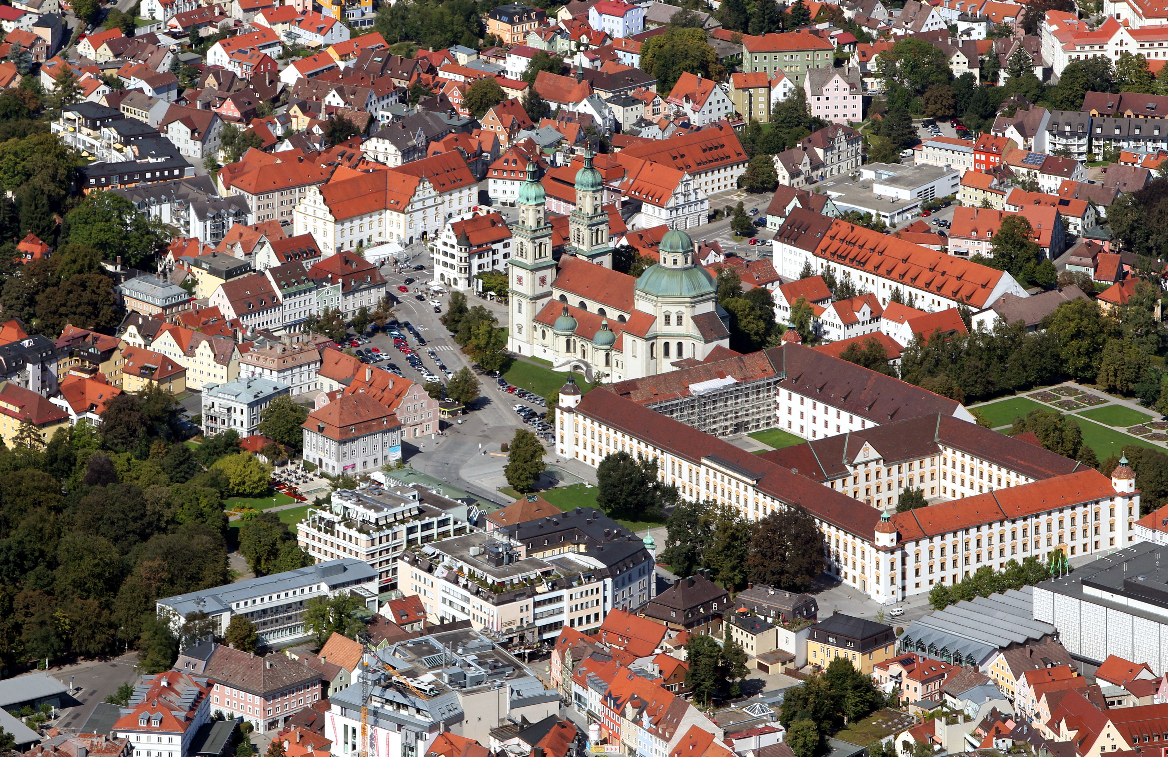 Fürstäbtliche Residenz und Basilika St. Lorenz in Kempten (Allgäu)